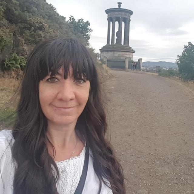 Júlia Zabala a Edimburgh